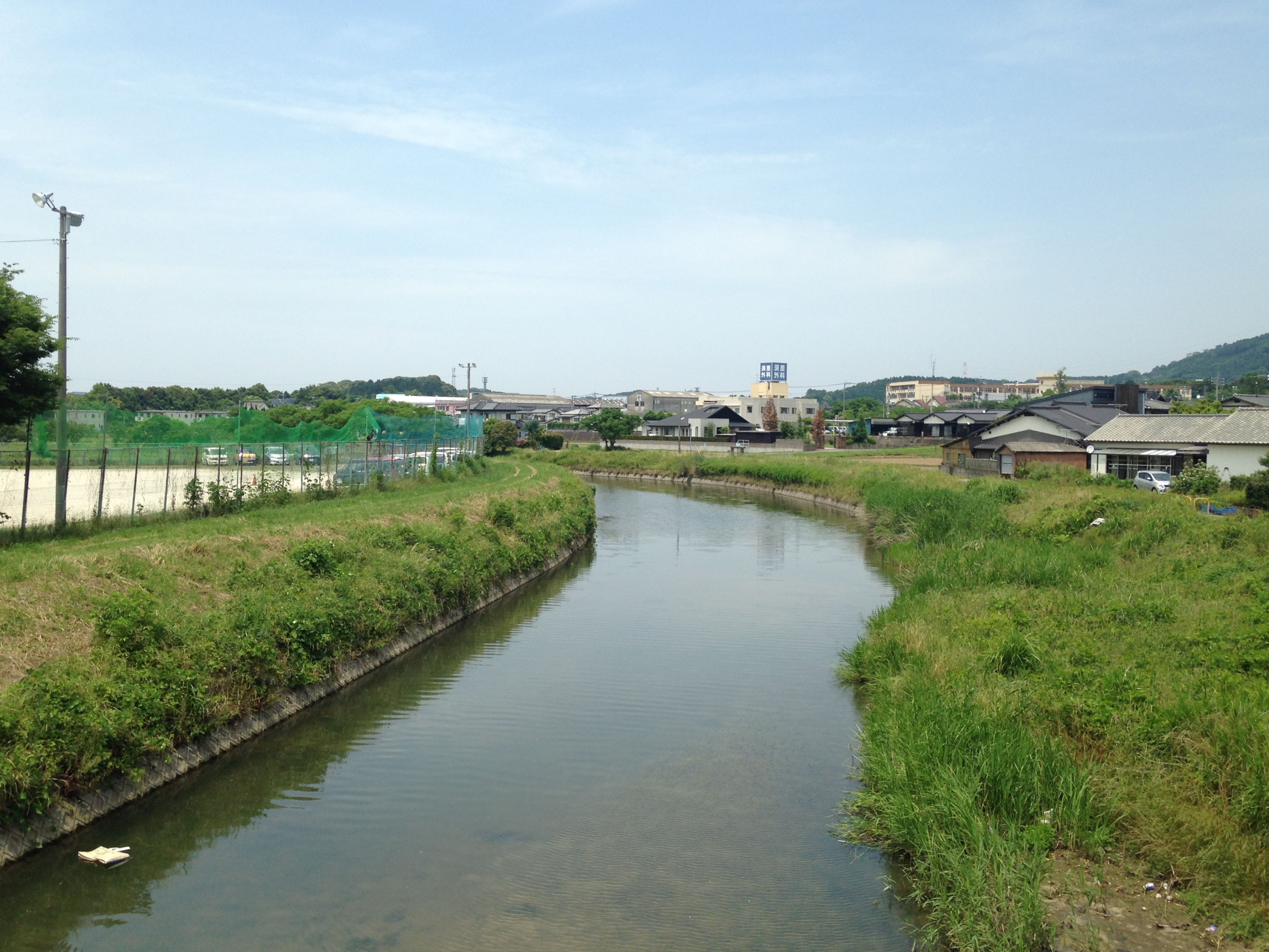 新旅石大橋より望む須恵川(下流側)